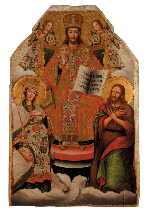 Ікона «Деісус», що є частиною деісусного ряду, дає відчуття грандіозності всього іконостасу. За силою художнього лаконізму, епічного монументального узагальнення постатей ця композиція може витримати зіставлення з середньовічними мозаїками та фресками, але таке враження досягається вже іншими засобами живописної пластики.